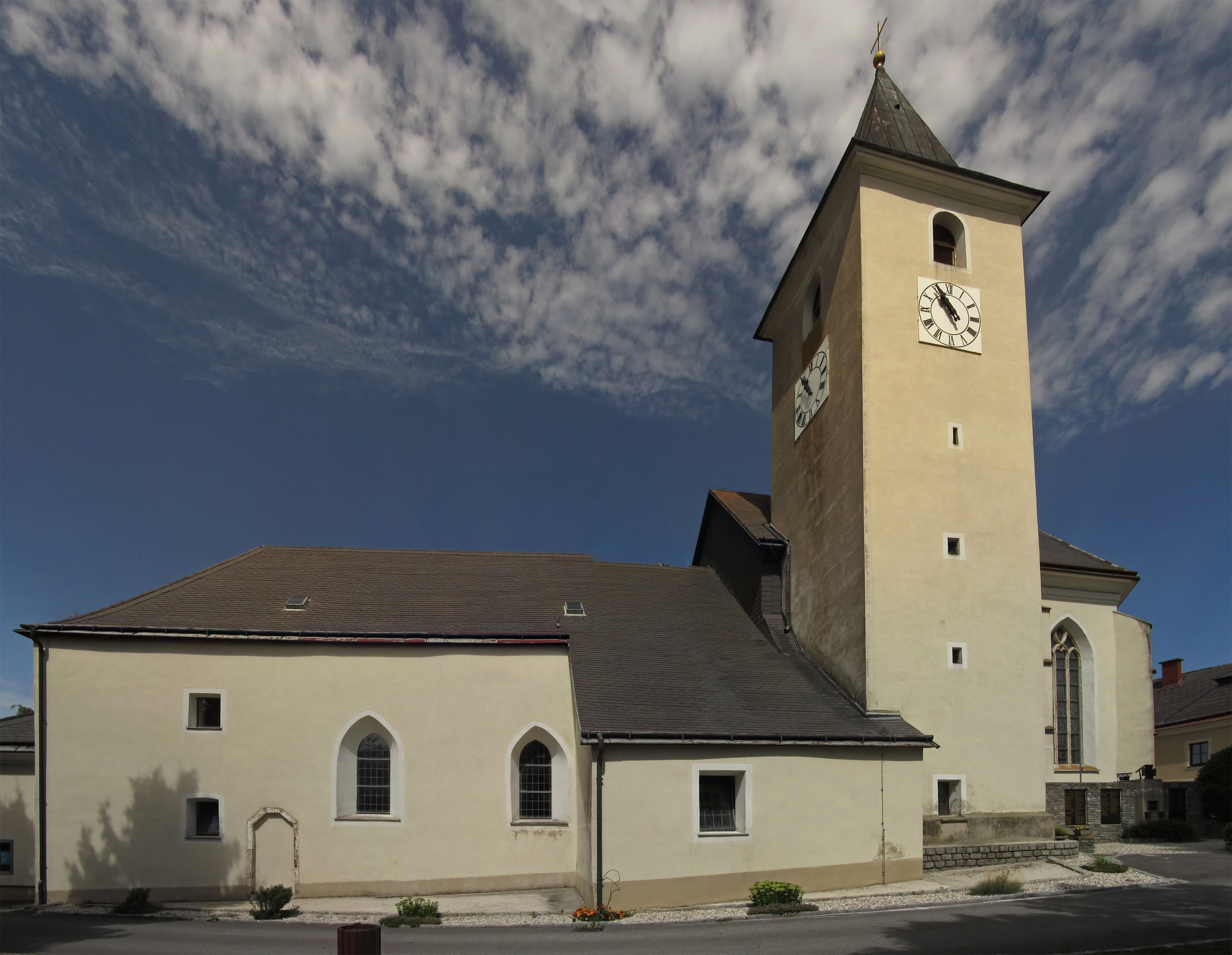 Ursprünglich romanisches Bauwerk, später weitgehend verändert. Gotischer Chor und Südkapelle; barockisierter Turm. Kirchweihe 1140 durch den Bischof von Passau.